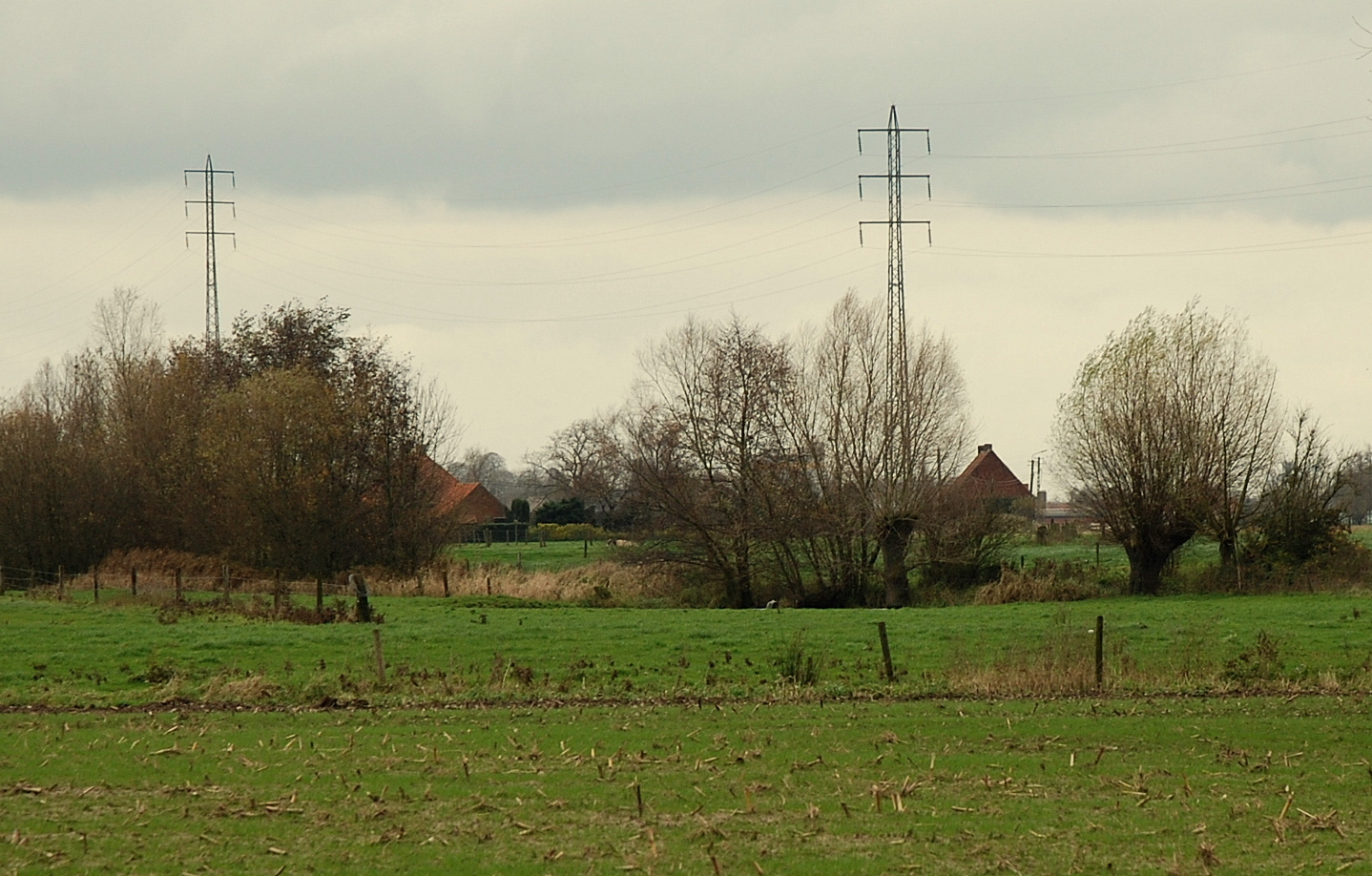 De heksenput, begraafplaats van Tanneken Sconynckx, te Gottem, België